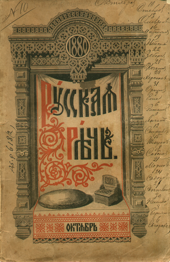 "Русская речь", обложка журнала 1880 г.